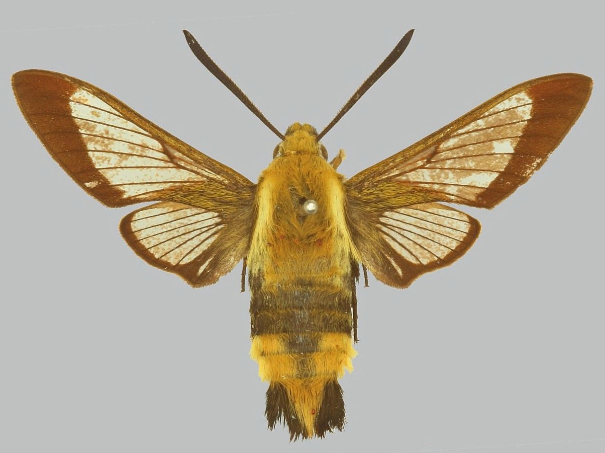 Hemaris affinis самец из России, река Амур